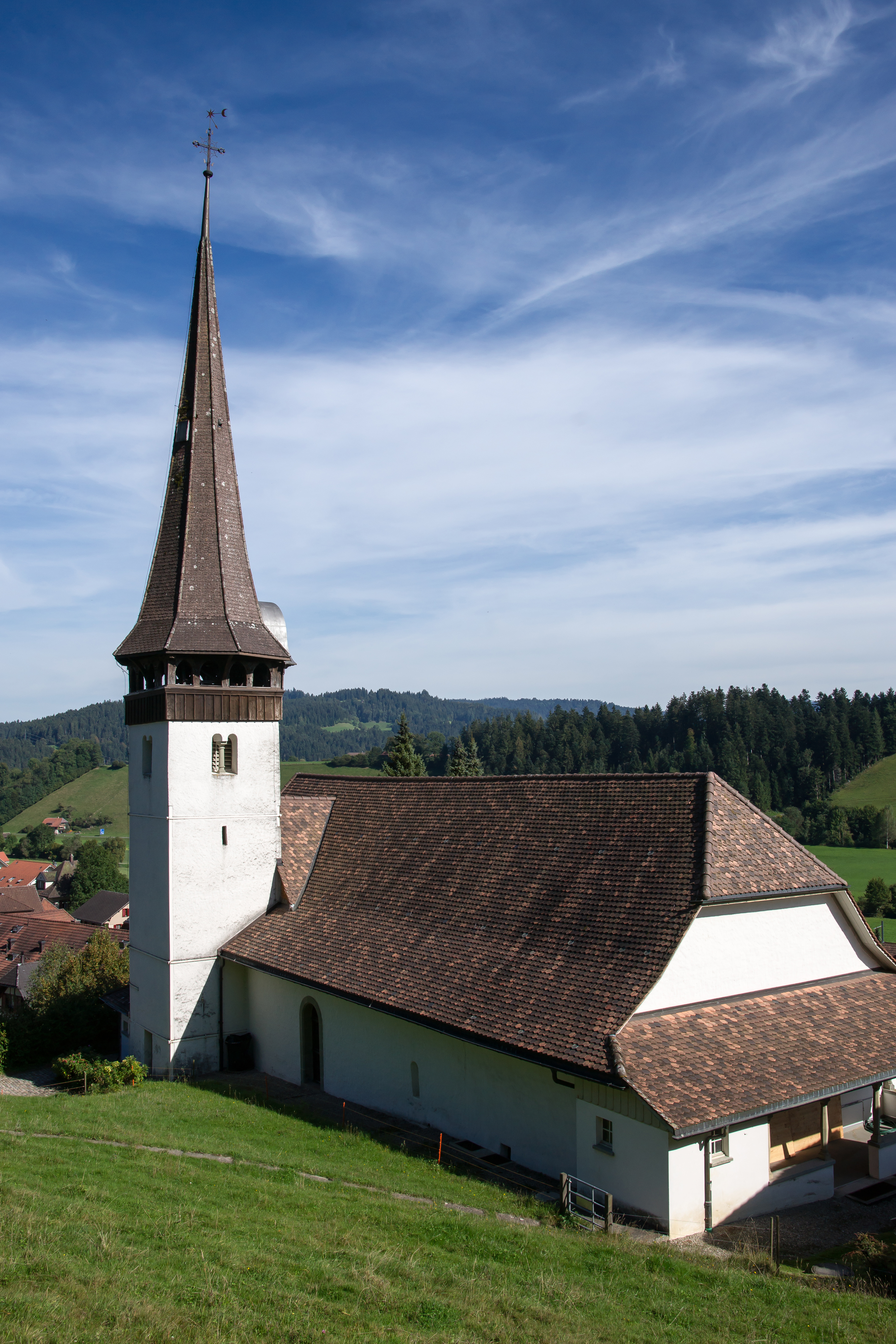 Reformierte Kirche